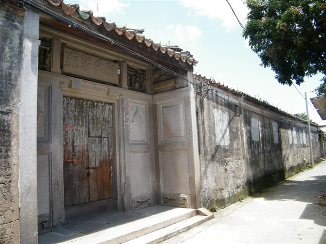 达濠 赤港陈氏家庙之二